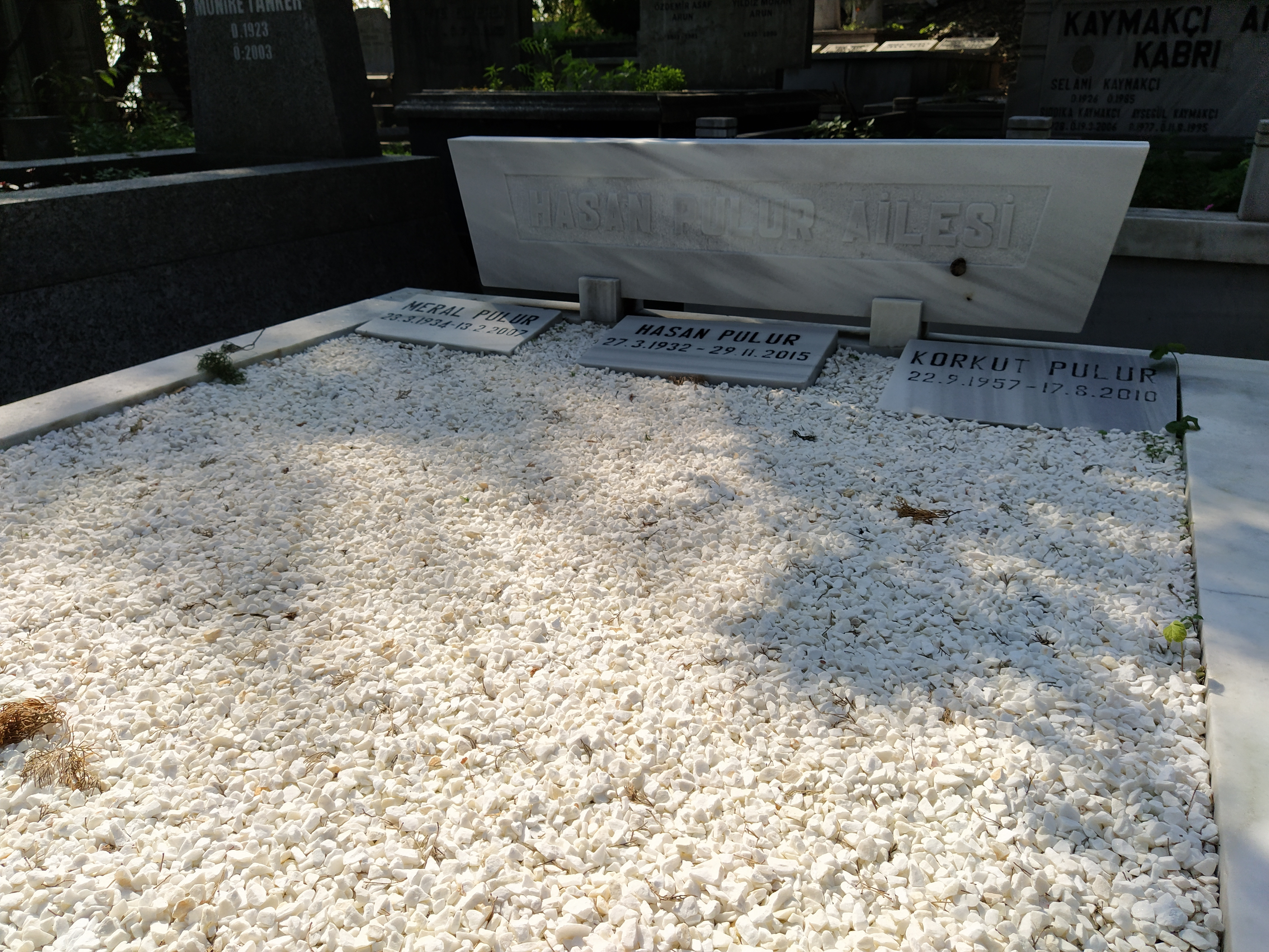 Oğlu ve eşi ile birlikte yan yana yatan Hasan Pulur'un Aşiyan Mezarlığı'ndaki kabri